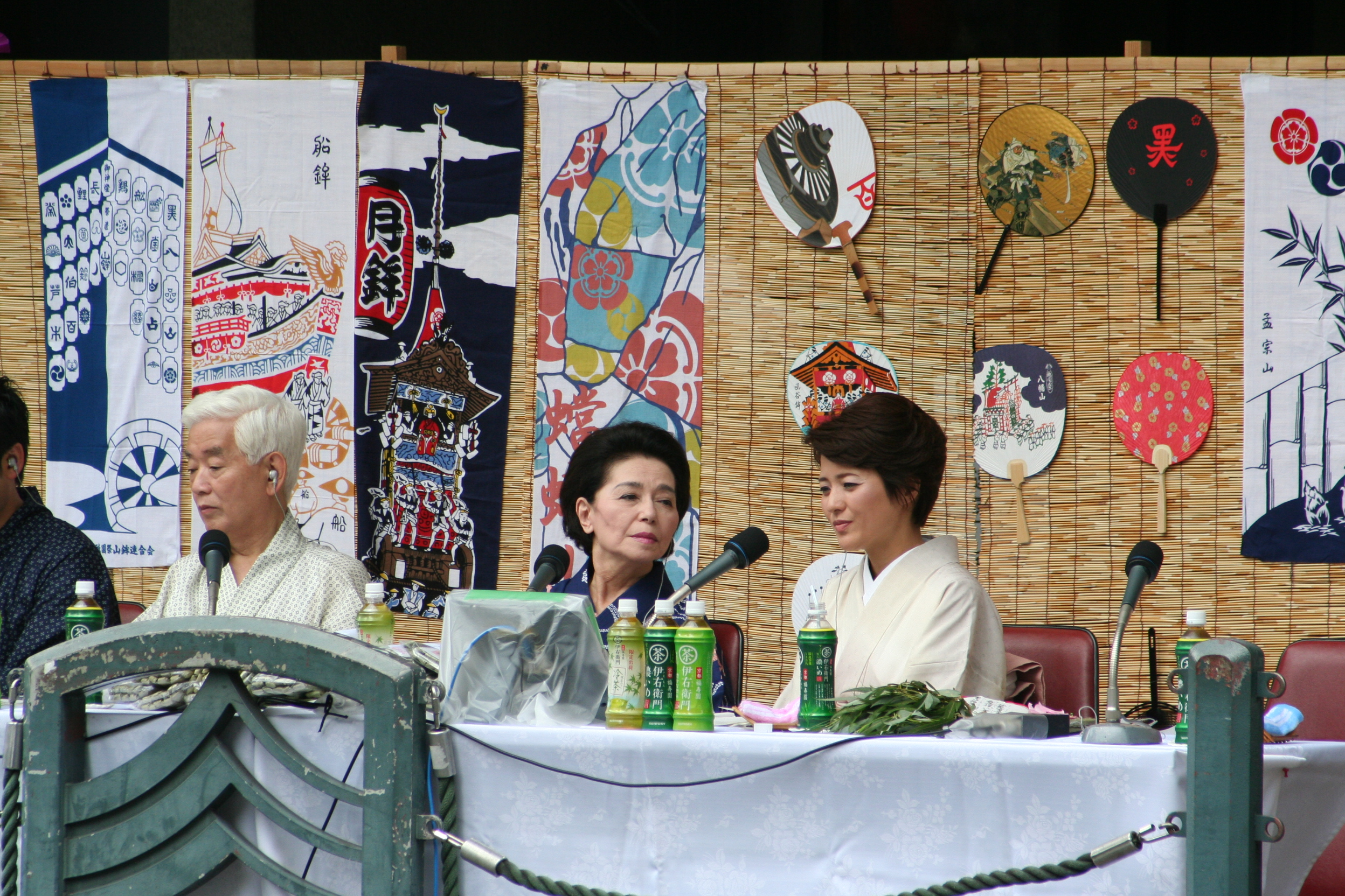 2009年7月17日に京都市で行なわれた祇園祭山鉾巡行の様子。 市田ひろみと三田寛子